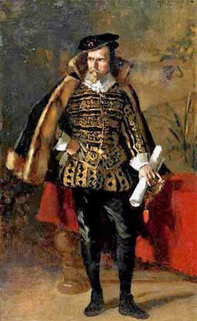 Rollenportrait Max Grube als "Burleigh" in "Maria Stuart" (Schiller)